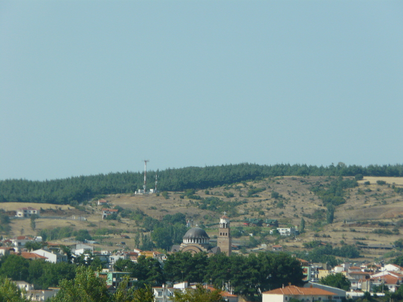 Димотика